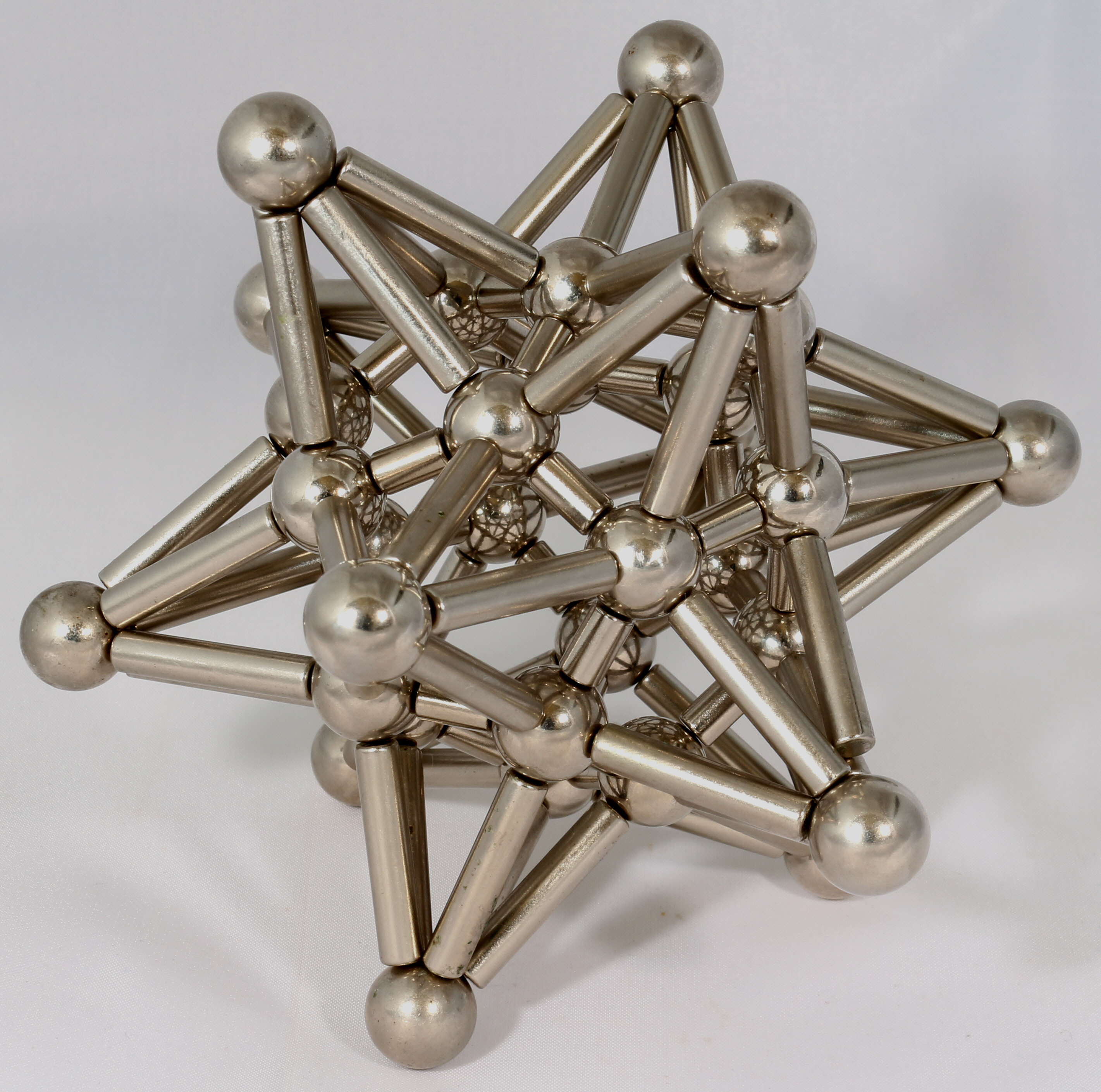 Dodekaeder bestehend aus 20 Stahlkugeln (d=13 mm) und 30 NdFeB Magnetstäben (d=5mm, l=8mm) - dazu, in jedem der 12 Seitenelemente des Dodekaeders, eine spitze Fünfecks-Pyramide mit zusätlich 1 Stahlkugel (d=13 mm) und 5 NdFeB Magnetstäben (d=5mm, l=25mm) zur Stabilisierung. In Summe also 32 Stahkugeln, 30 kurze und 60 lange Magnetstäbe.